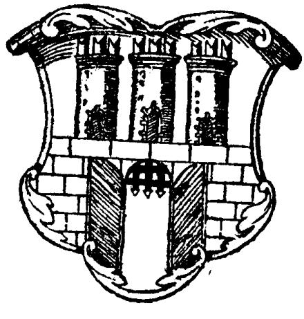 Herb według Piekosińskiego, wzorowany na przedstawieniu Ambrożego z Nysy